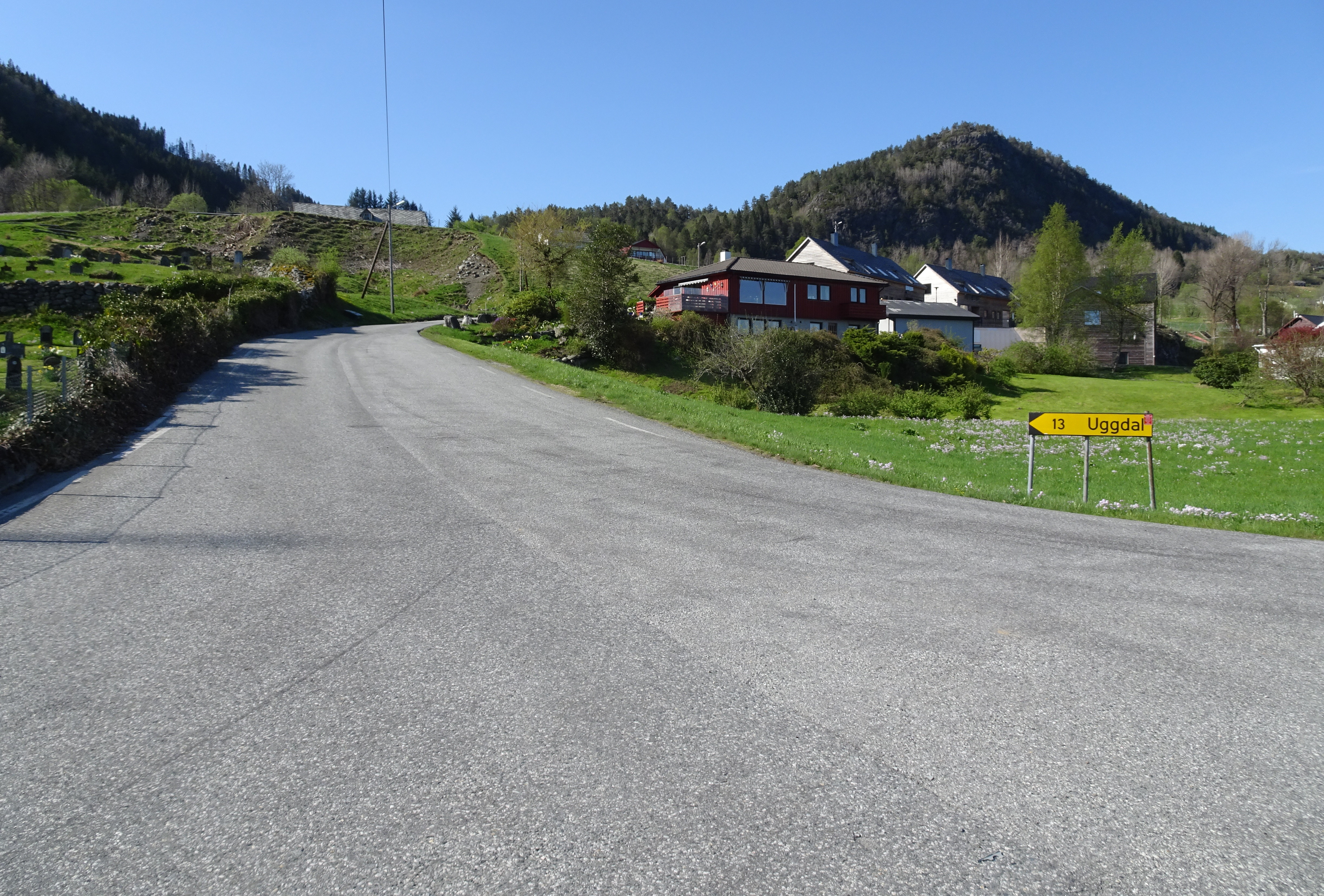 Fjellvegen, østenden av fylkesvei 5078 (tidl. 79) i Onarheim